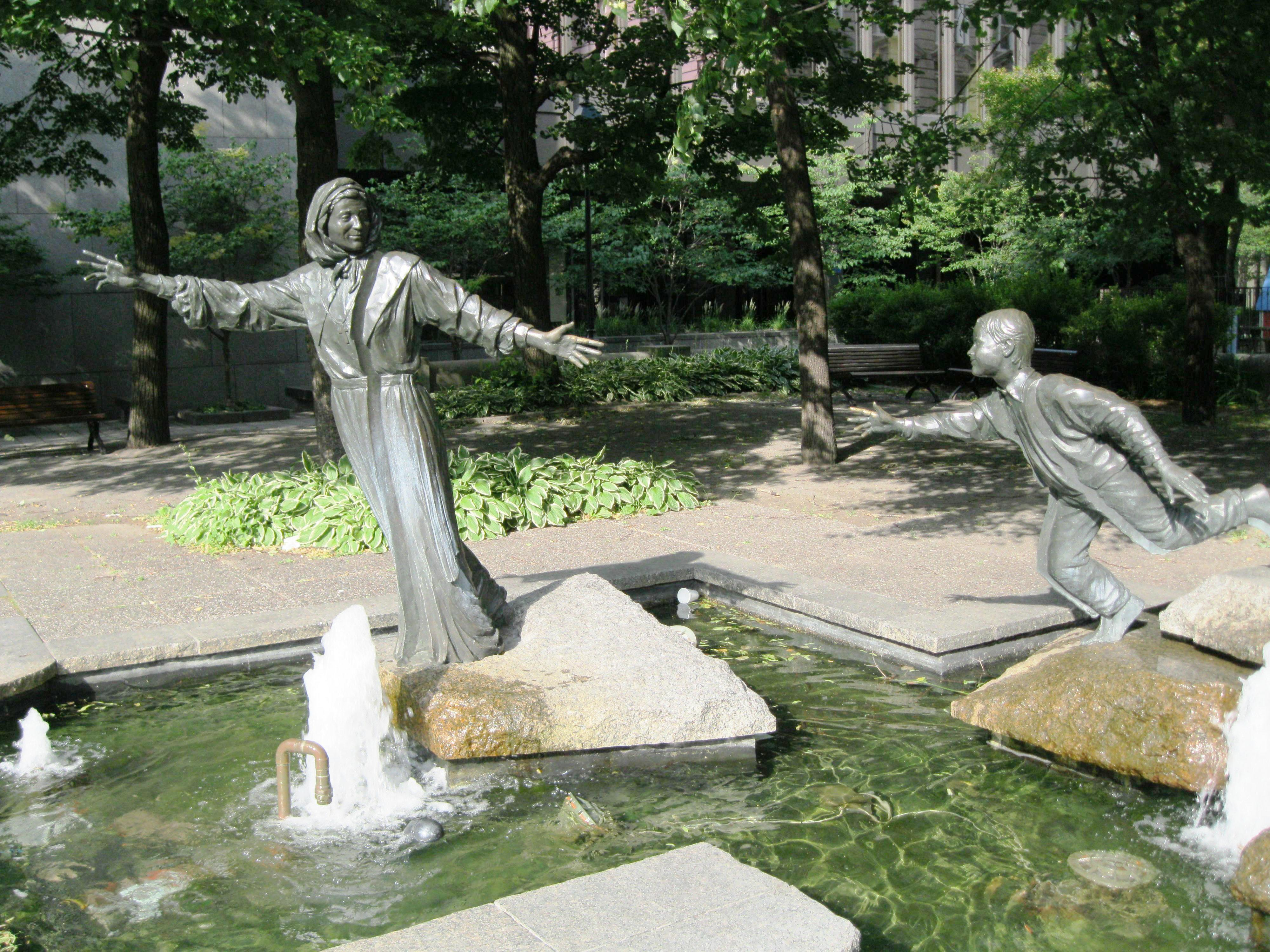 Hommage à Marguerite Bourgeois par Jules Lasalle, oeuvre située rue Notre-Dame dans le Vieux-Montréal